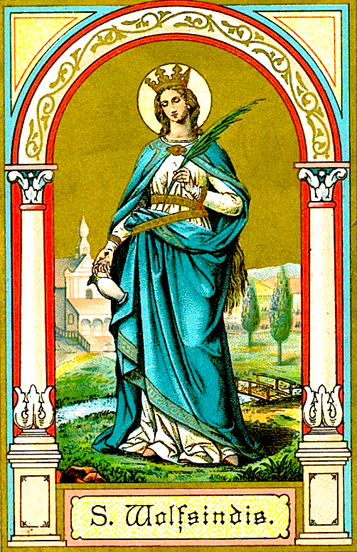 Cвятая дева мученица Вольфзинда.